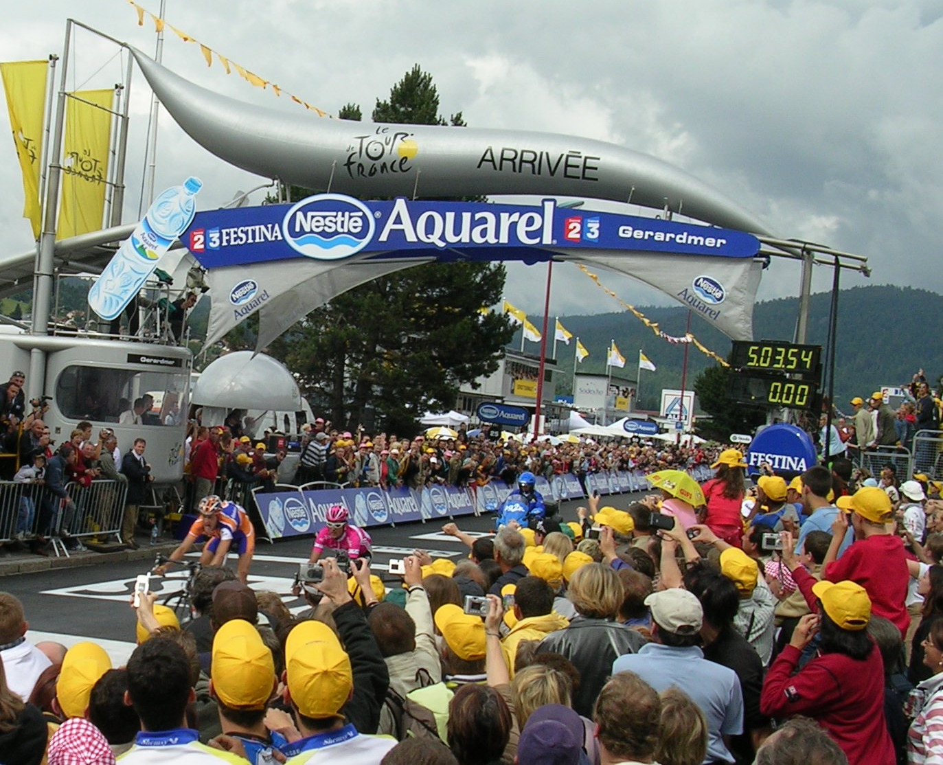 Arrivée de la 8ème étape du Tour de France 2005 à Gérardmer. Pieter Weening l'emporte devant Andreas Klöden.